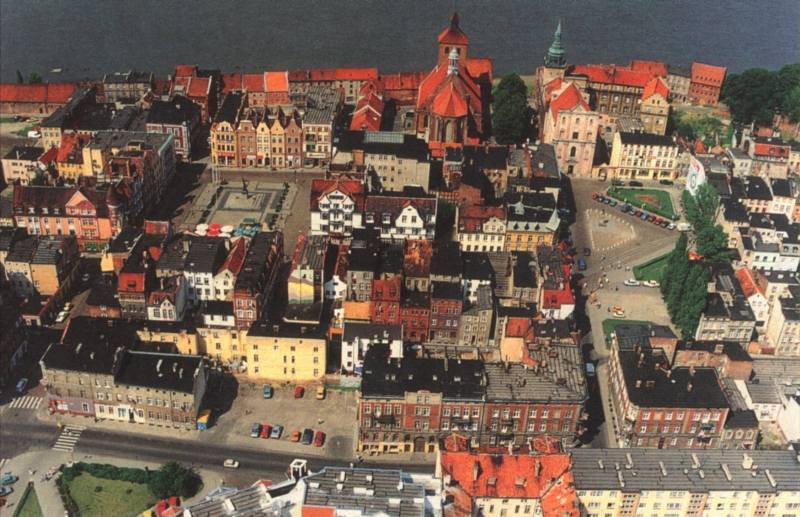 Panorama Grudziądza z lotu ptaka